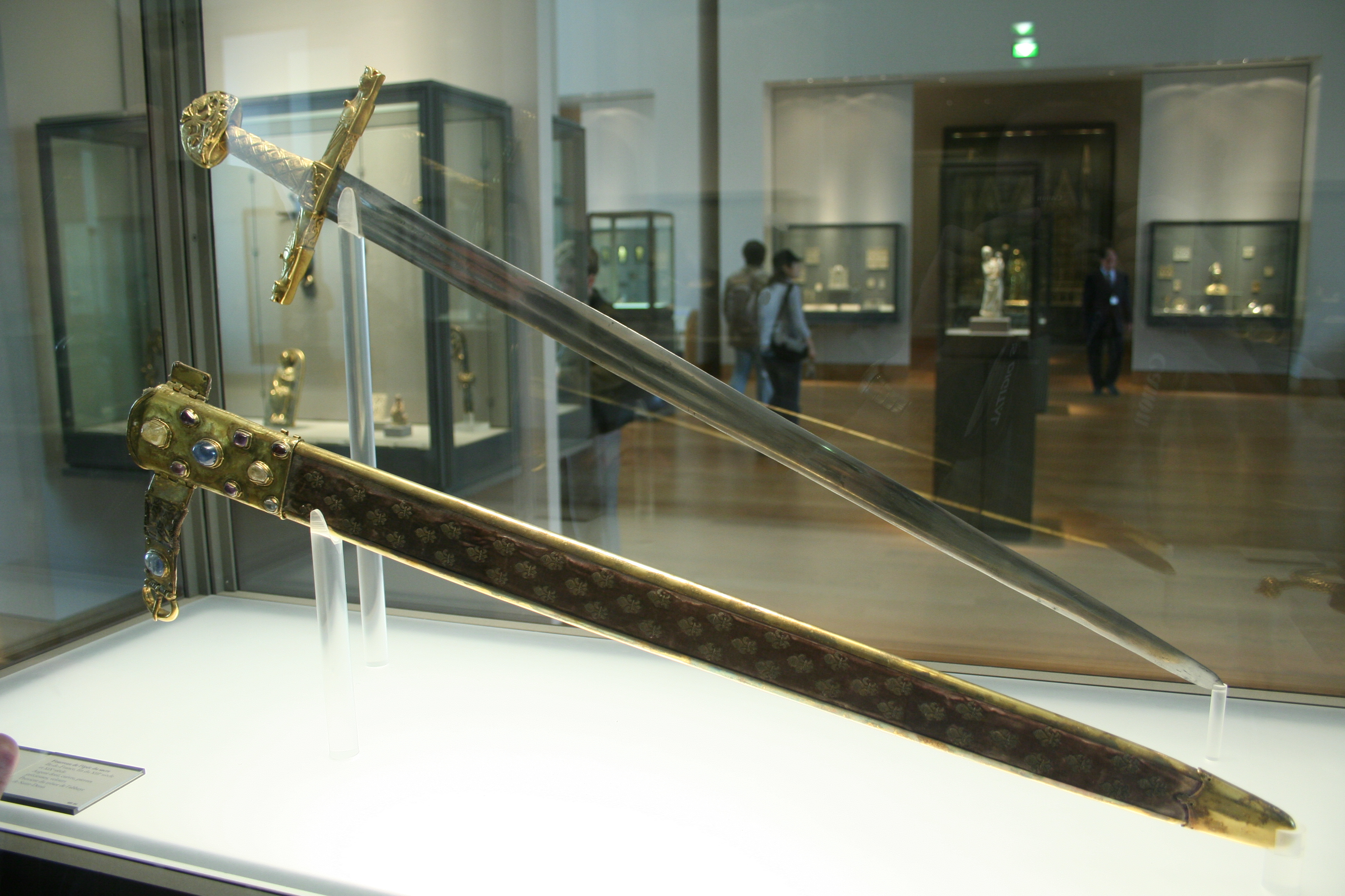 Joyeuse, l'Epée du sacre et son fourreau, fin du XIIIème siècle, musée du Louvre, Paris